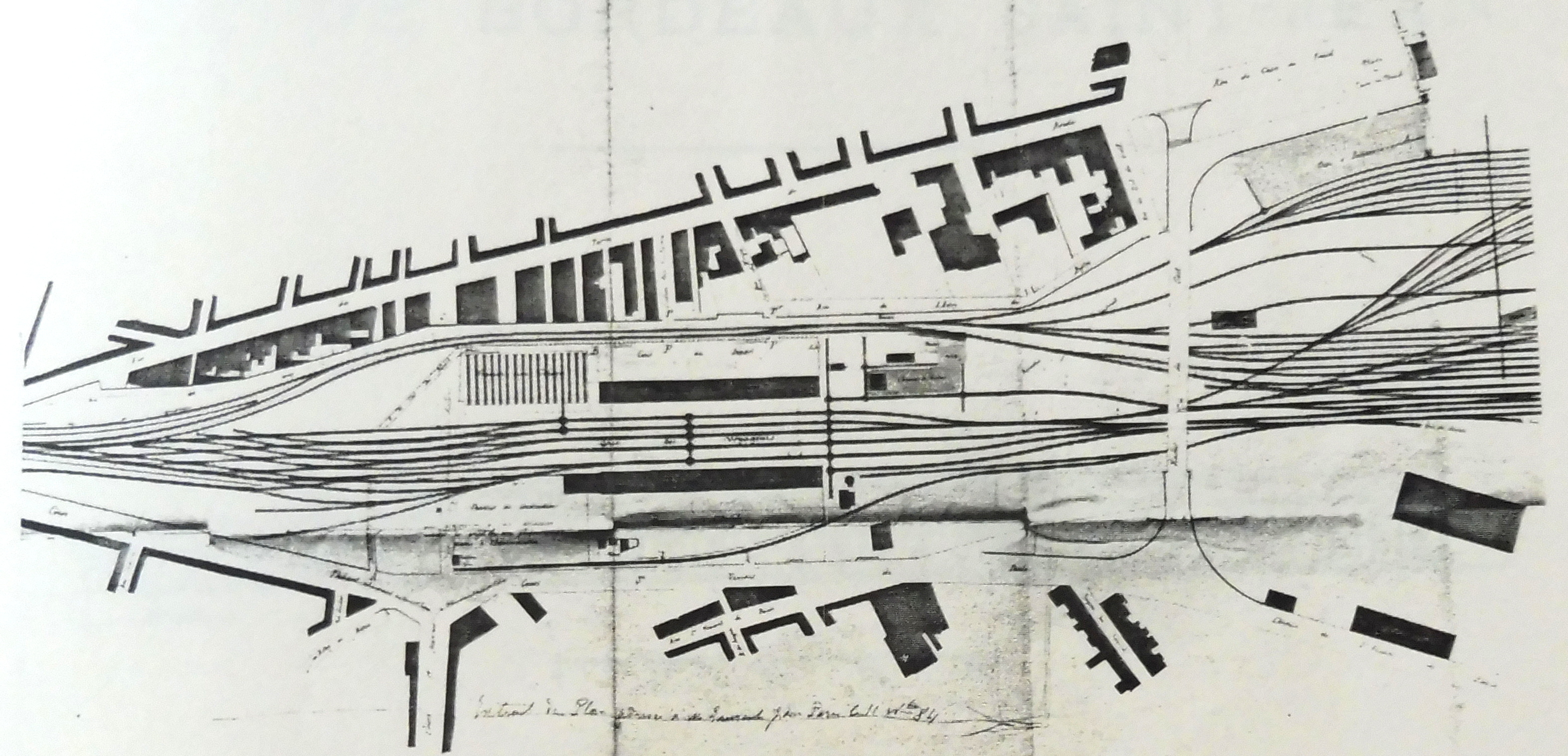 État de la gare provisoire Saint-Jean ou gare en bois, plan d'ensemble du 11 mars 1882 (archives SNCF, Bordeaux, carton 2).